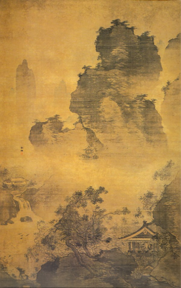 Retour hâtif avant la pluie est une peinture du peintre chinois Zhang Lu (XVe-XVIe siecles). Rouleau mural, encre et couleur sur soie, dynastie des Ming. Ses dimensions en centimètres sont: 183,5x110,5. Elle est conservée au Musée du palais impérial de Beijing.